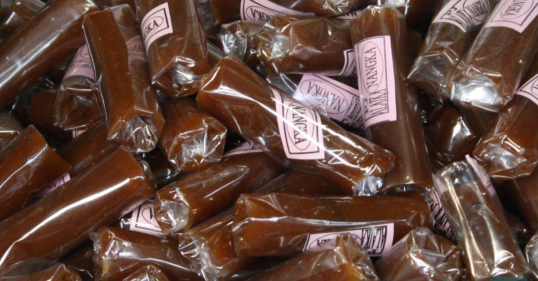 Jenang kudus adalah makanan khas kudus jawa tengah Indonesia